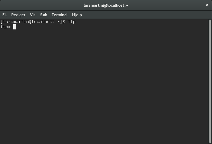 Fedora FTP terminal